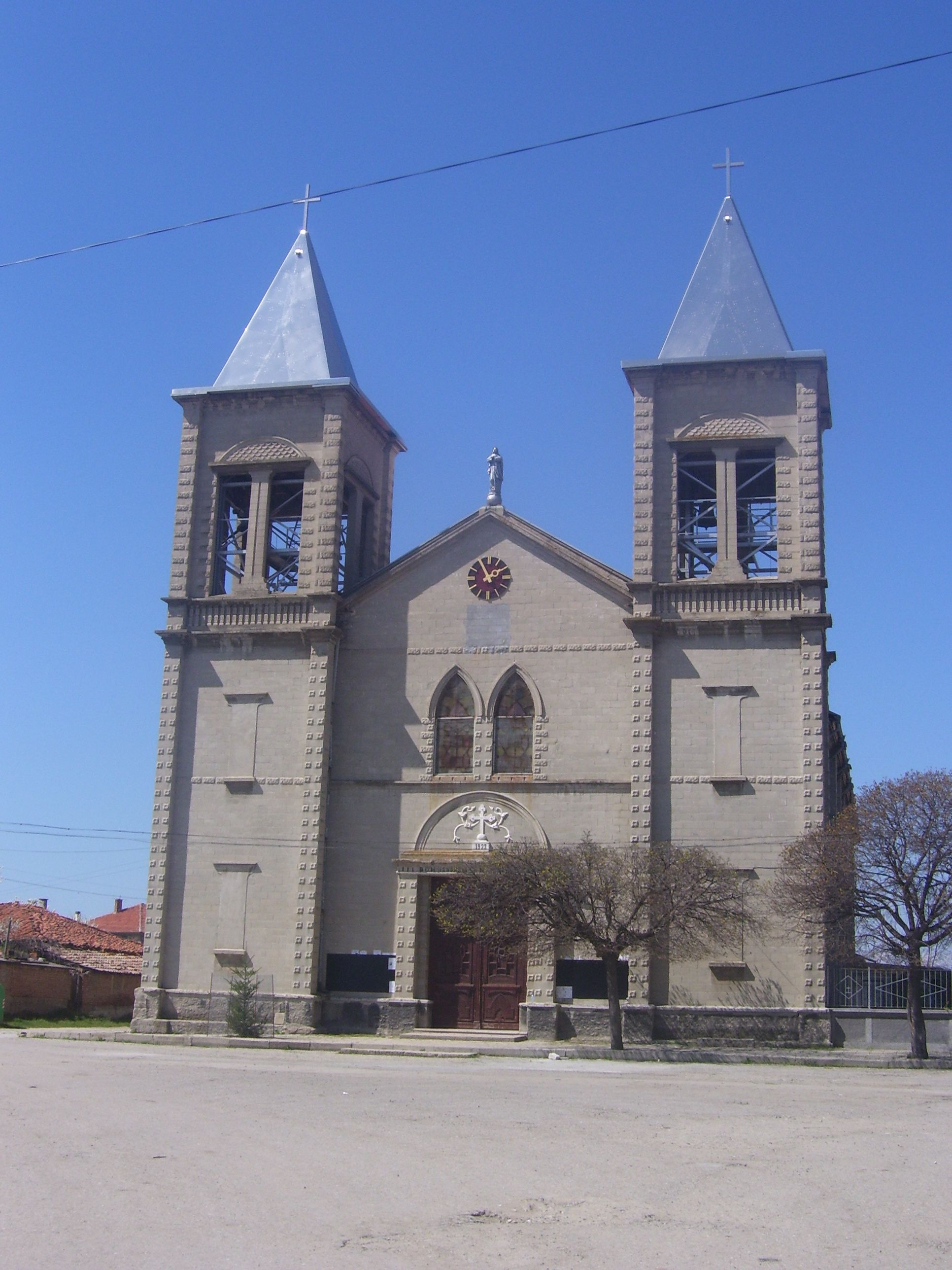 Католическа църква в Житница, Пловдивско, България.